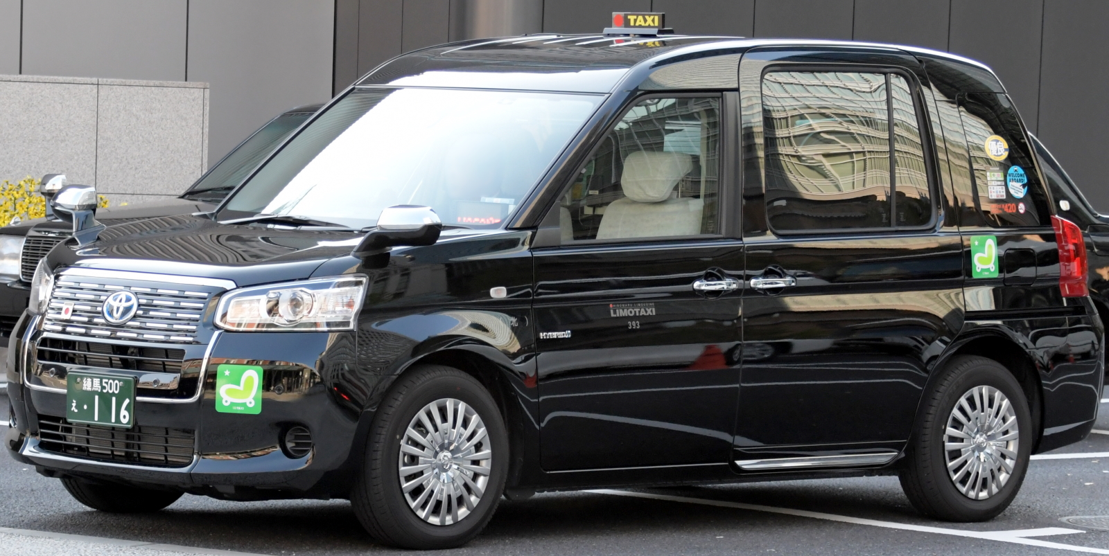 日の丸リムジンのジャパンタクシー